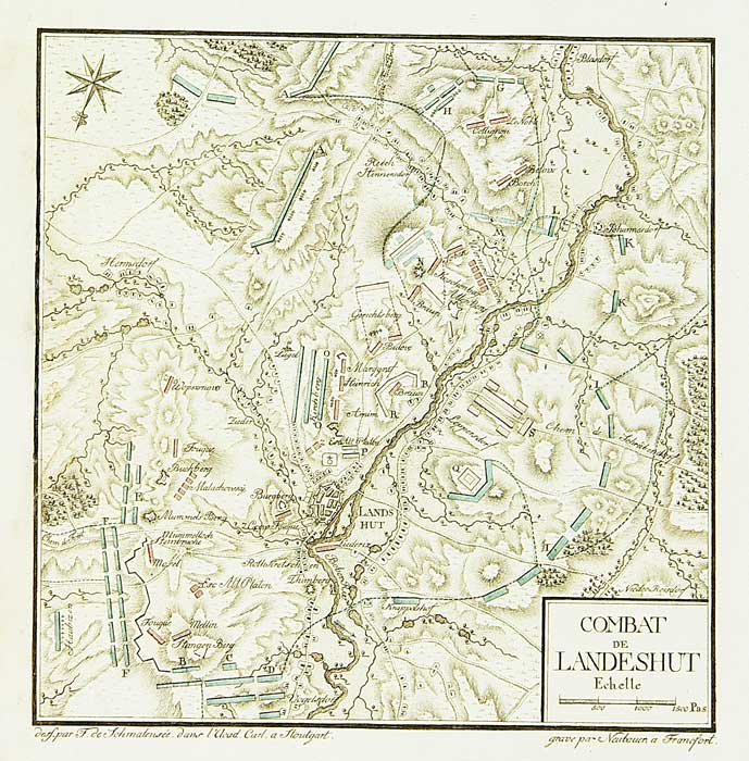 Схема битвы при Ландесхуте